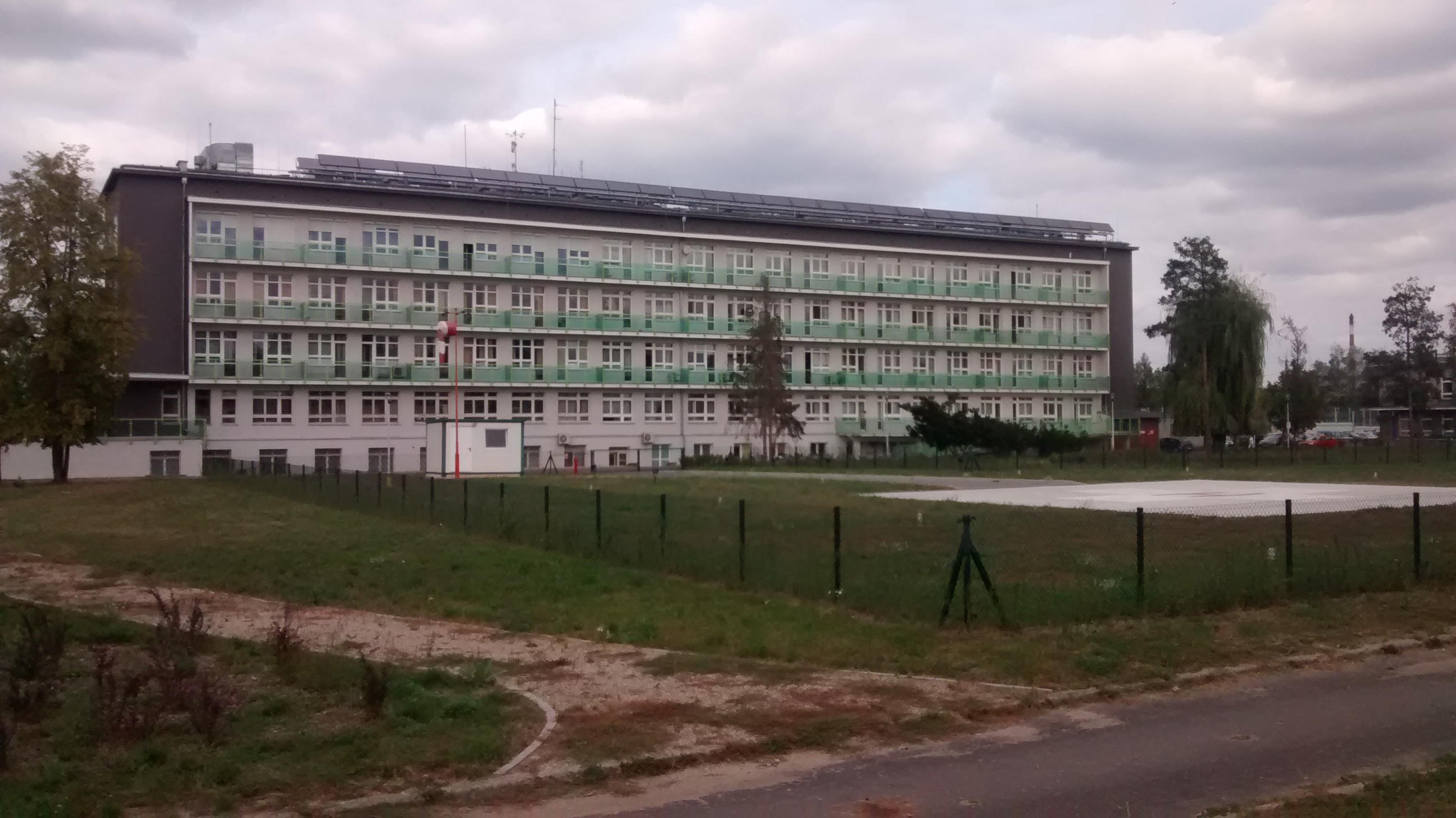 Szpital od strony południowej z lądowiskiem